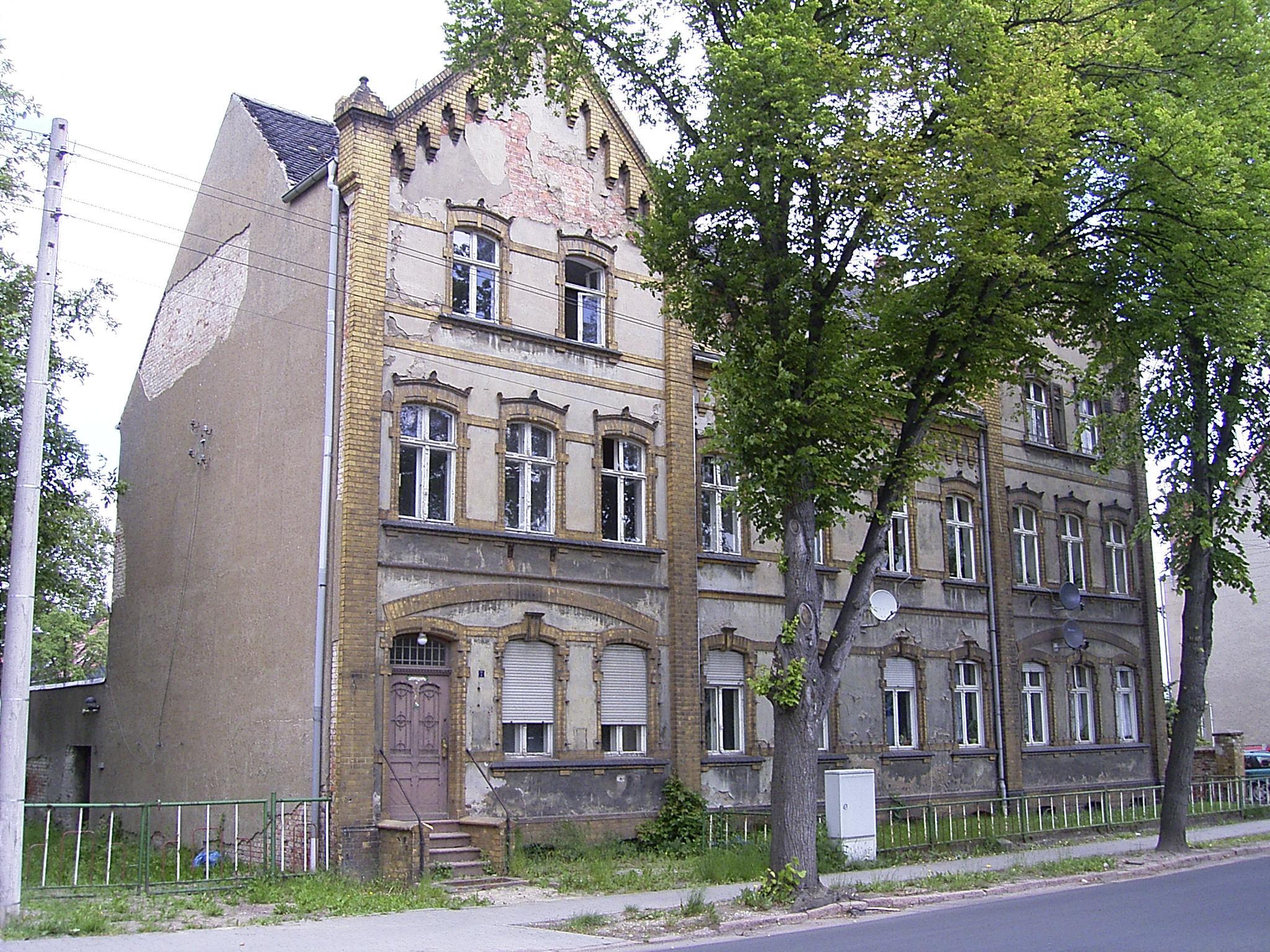 Kaiserliches Postamt Radegast Anhalt